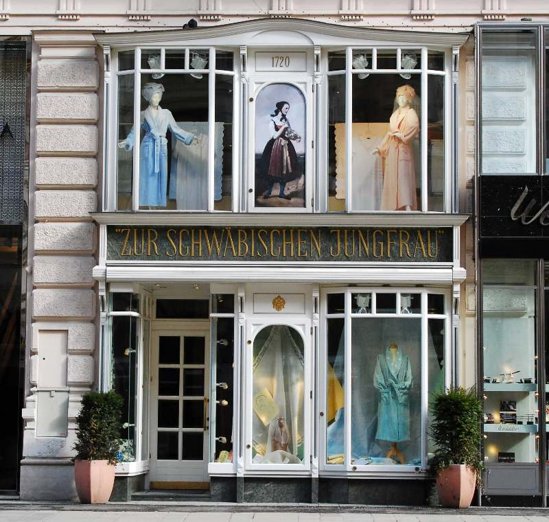 Das Geschäft "Zur schwäbischen Jungfrau" am Graben im 1. Wiener Gemeindebezirk